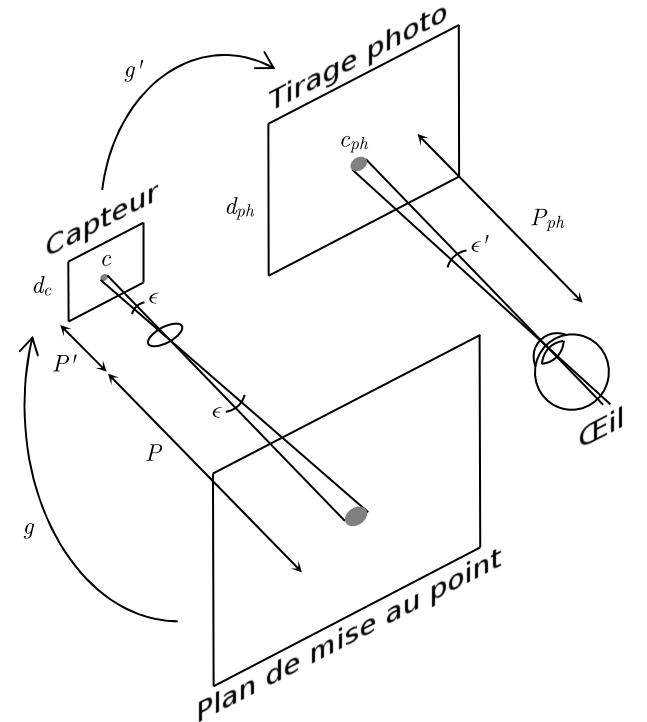 Illustration faisant apparaître les différentes grandeurs rentrant en ligne de compte dans la perception de la netteté sur une photographie.